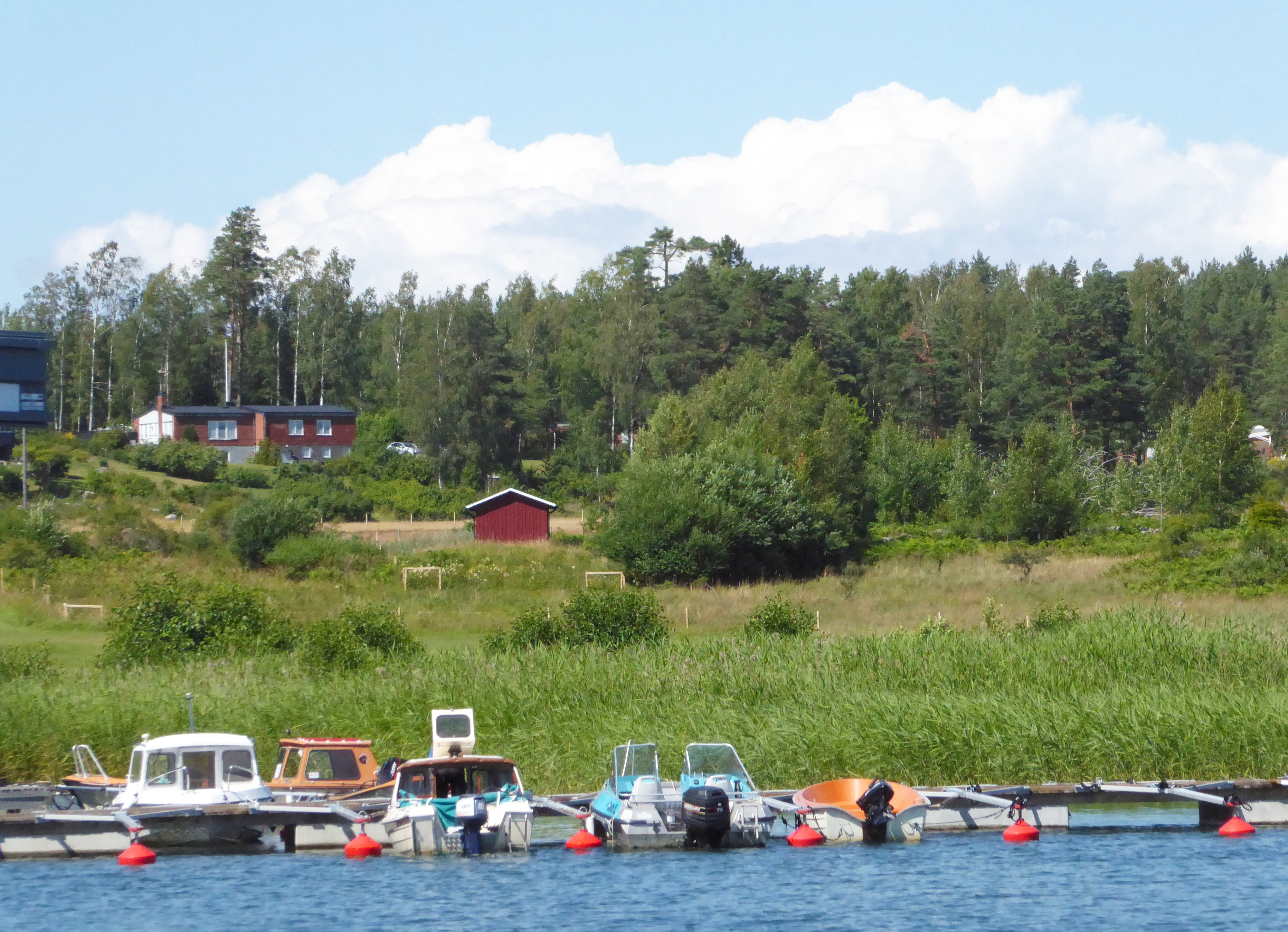 Hamnen vid Studsvik brygga